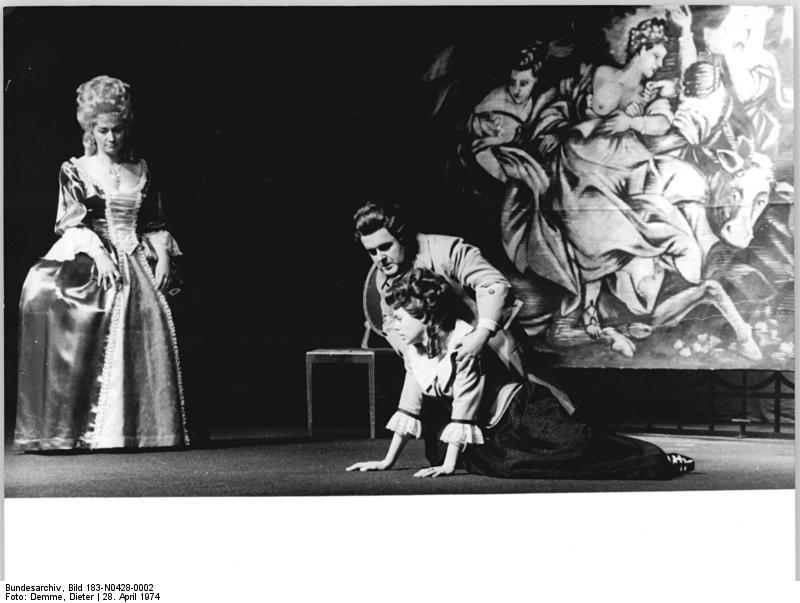 Gotha, Arbeitertheater, Probe ADN-ZB Demme 28-4-74 Gotha: Arbeitertheater spielt Lessings "Emilia Galotti" - Szenenfoto einer Probe zu Lessings Trauerspiel. Mit diesem Schauspiel stellt sich das Arbeitertheater des VEB Lufttechnik Gotha seinem Publikum zu den 15. Arbeiterfestspielen im Bezirk Erfurt vor. Die Gräfin Orsina spielt Brigitte Batke (l.). Die Eltern der Emilia werden von Martin König und Karin Heth dargestellt. Bitte auch das Motiv N0428-3 N beachten!